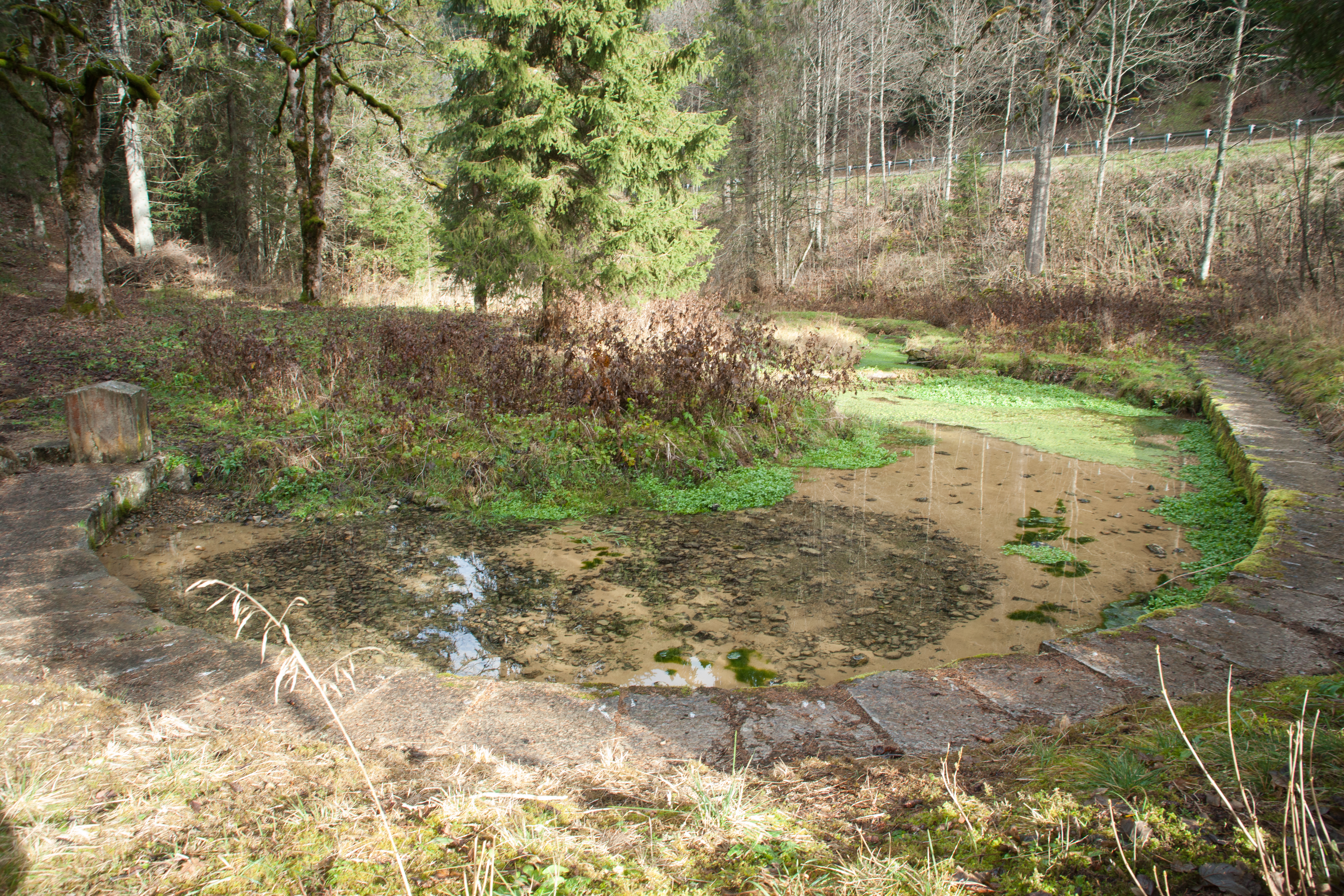 Source intermittente de Fontaine-Ronde, Doubs. France.